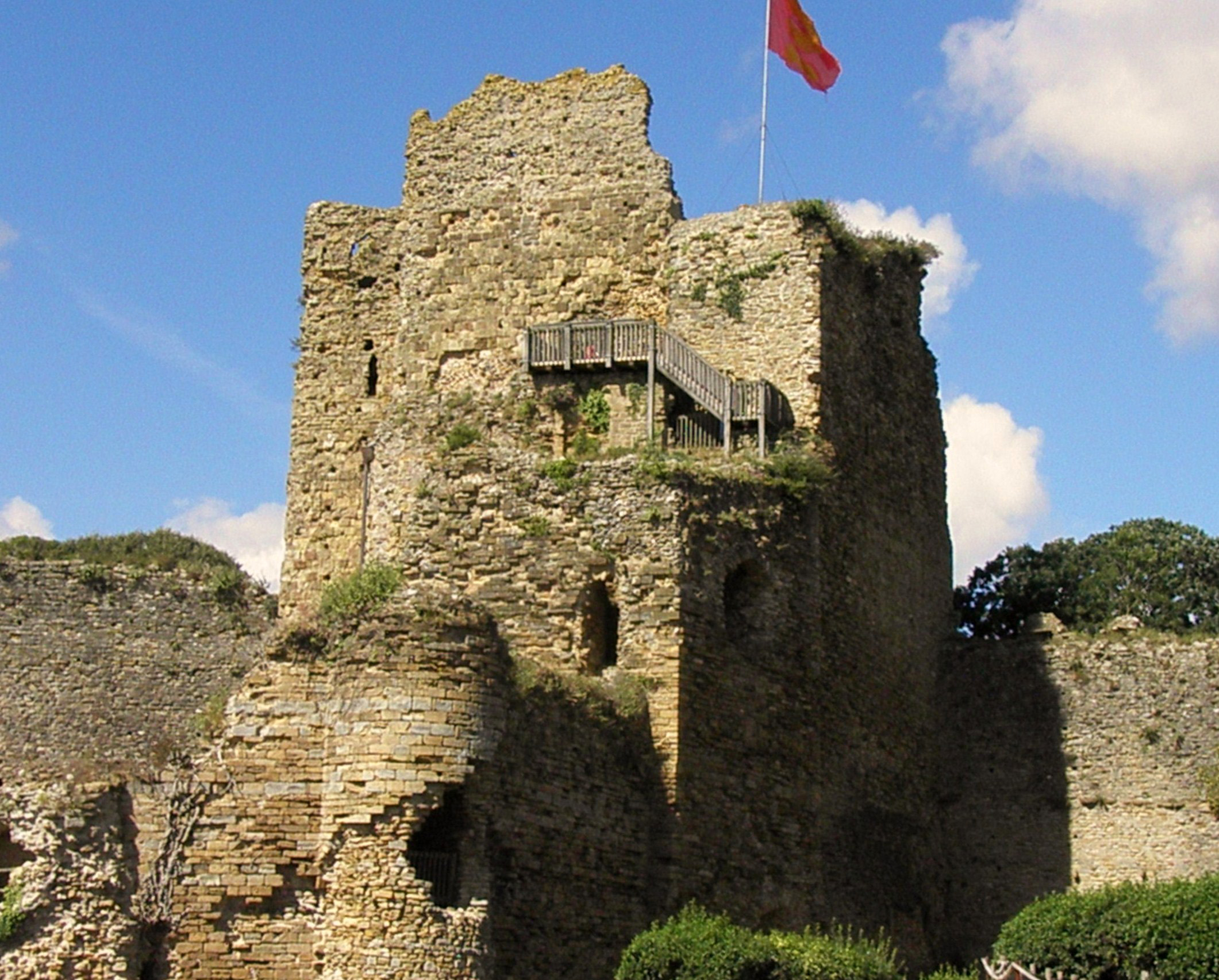 Château de Talmont. À l'arrière plan : Tour maitresse du château sur laquelle flottent les armes de Richard cœur de lion. Au premier plan : Tour d'angle de l'enceinte intérieure. Talmont-Saint-Hilaire, Vendée.